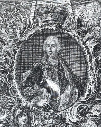 Fürst Karl Thomas zu Löwenstein-Wertheim-Rochefort (1714-1789)